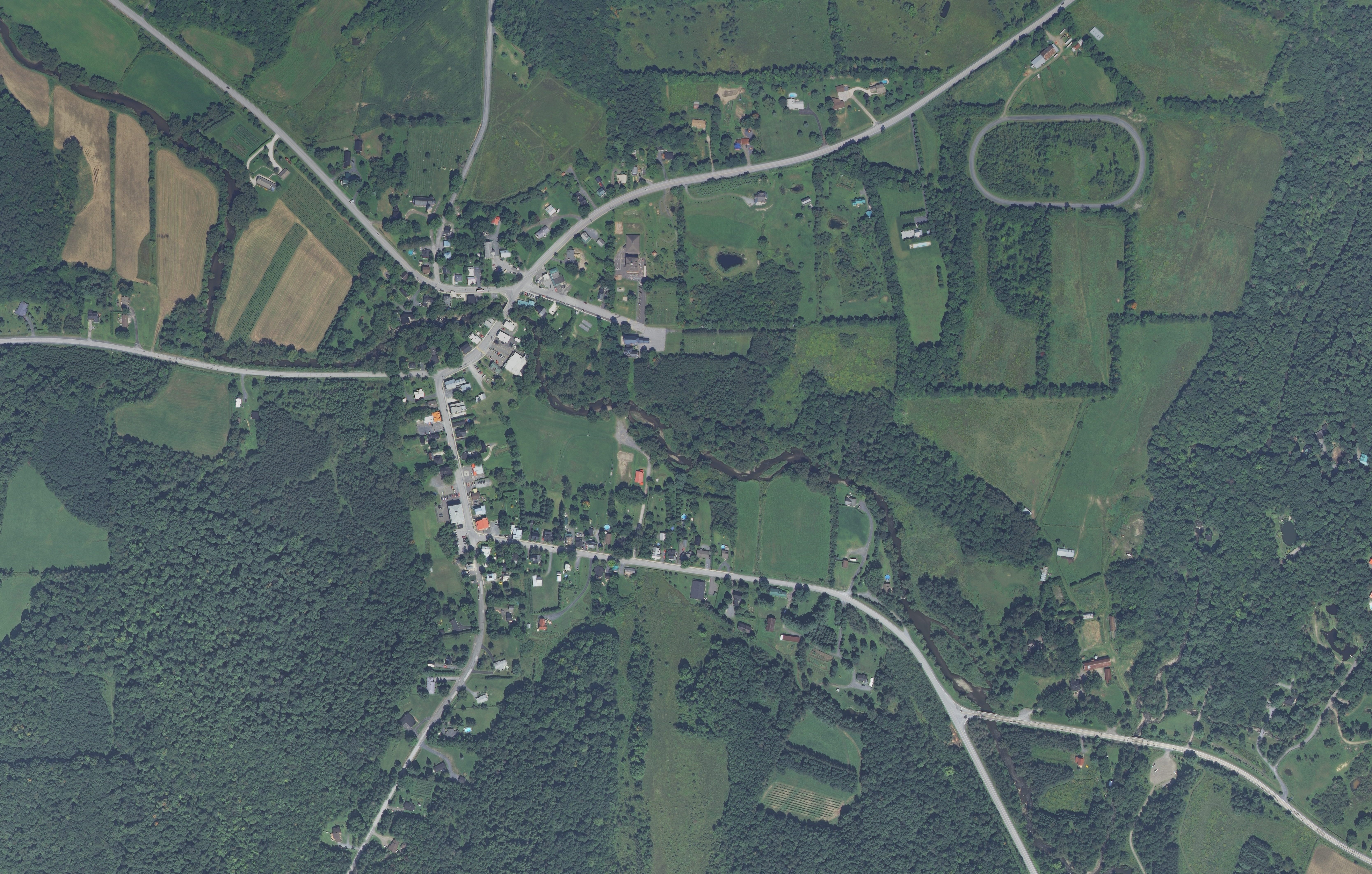 Vue satellite de Frelighsburg, Québec. Photo satellite fournie par l'U.S. Geological Survey (USGS)